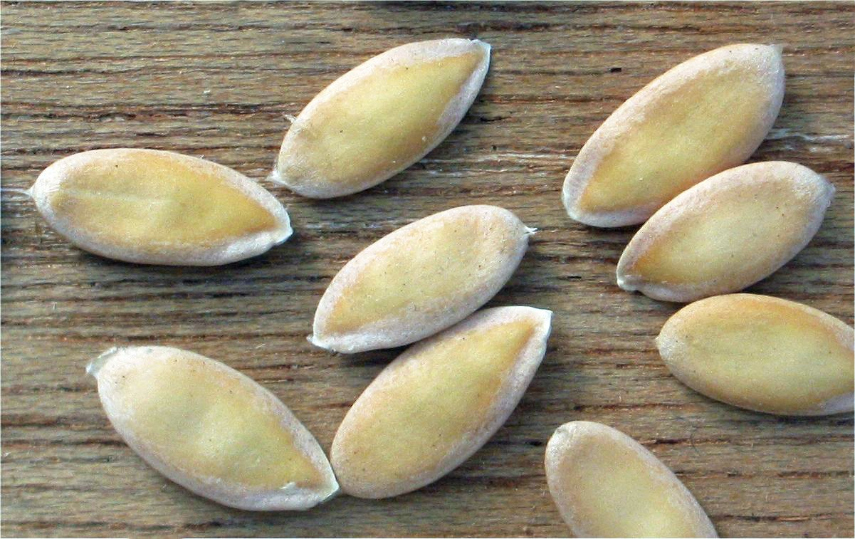 (nl: Meloenzaden 'Oranje ananas') Cucumus melo seeds 'Oranje ananas'